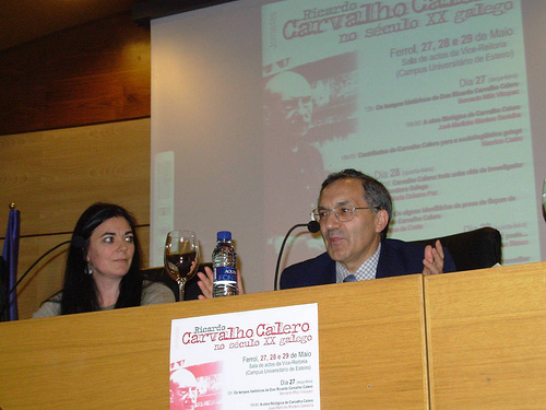 José Martinho Montero Santalha no simposio Ricardo Carvalho Calero no século XX galego, celebrado en Ferrol.